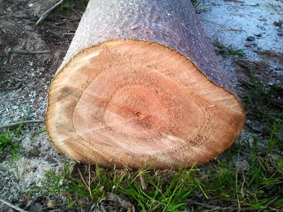 Trunchi Oxytree